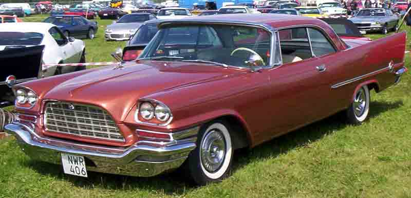 Chrysler 300C 1957